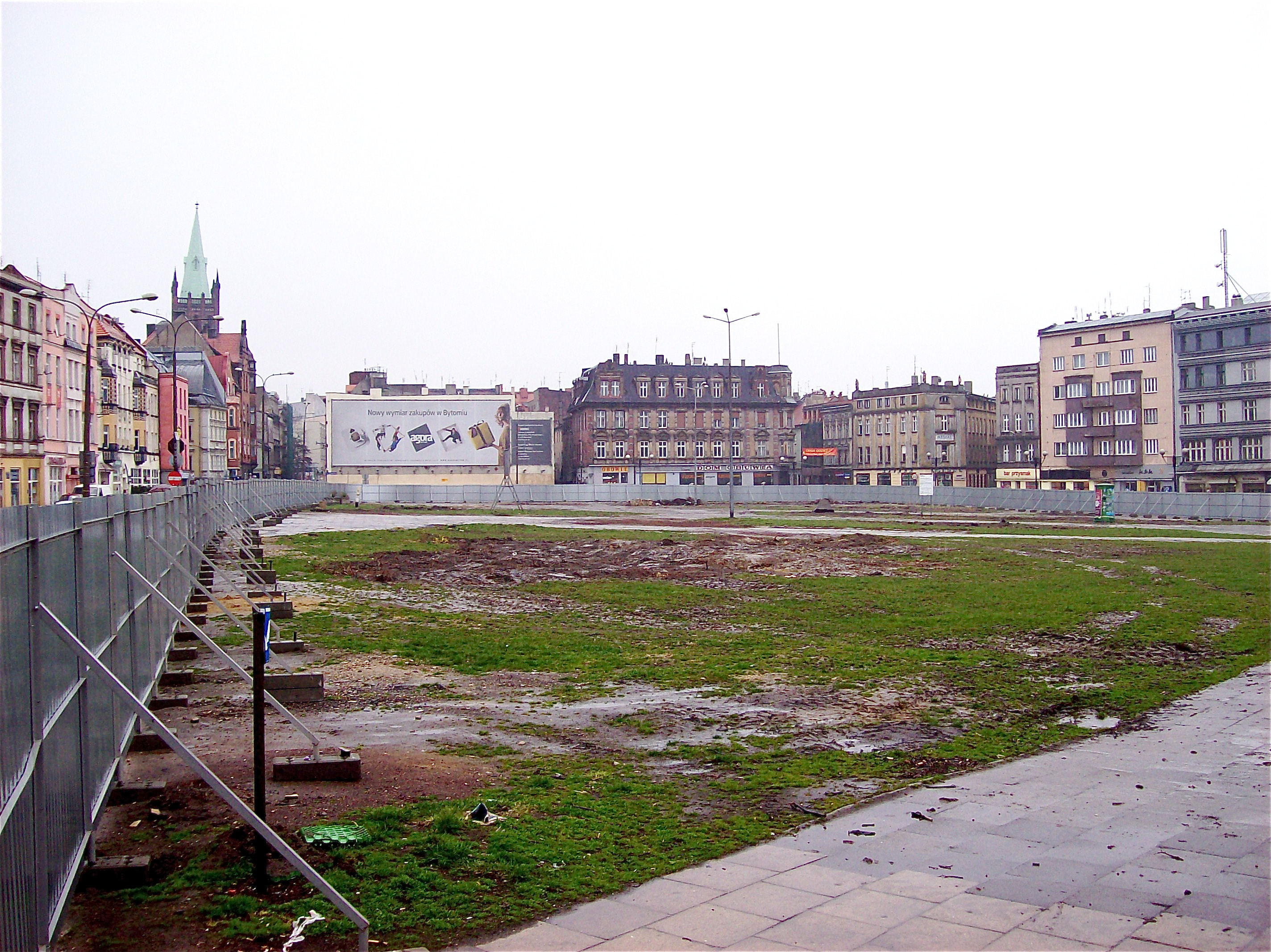 Plac Kościuszki w Bytomiu podczas zabudowy.